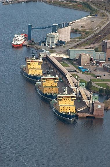 Gamla malmkajen, Cementa i bakgrunden med m/s Östanvik. Motiv: Luleå Nyckelord: Flygbilder Kategori: Hamnmiljöer Gamla malmkajen, Cementa i bakgrunden med m/s Östanvik.